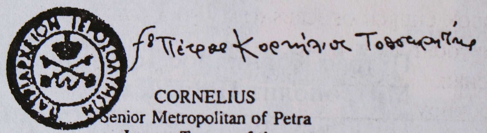 Подпись православного Митрополита Петры (Петрейского) Корнилия (Корнелиуса, Сеньора Метрополии Петры (лат.)), и.о. (местоблюстителя престола) Патриарха Иерусалимского Греческой церкви, под рождественским посланием митрополиту РПЦ Никодиму Руснаку. Иерусалим, конец декабря 2001 года.